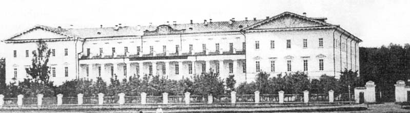 Здание историко-филологического института князя А. А. Безбродко.